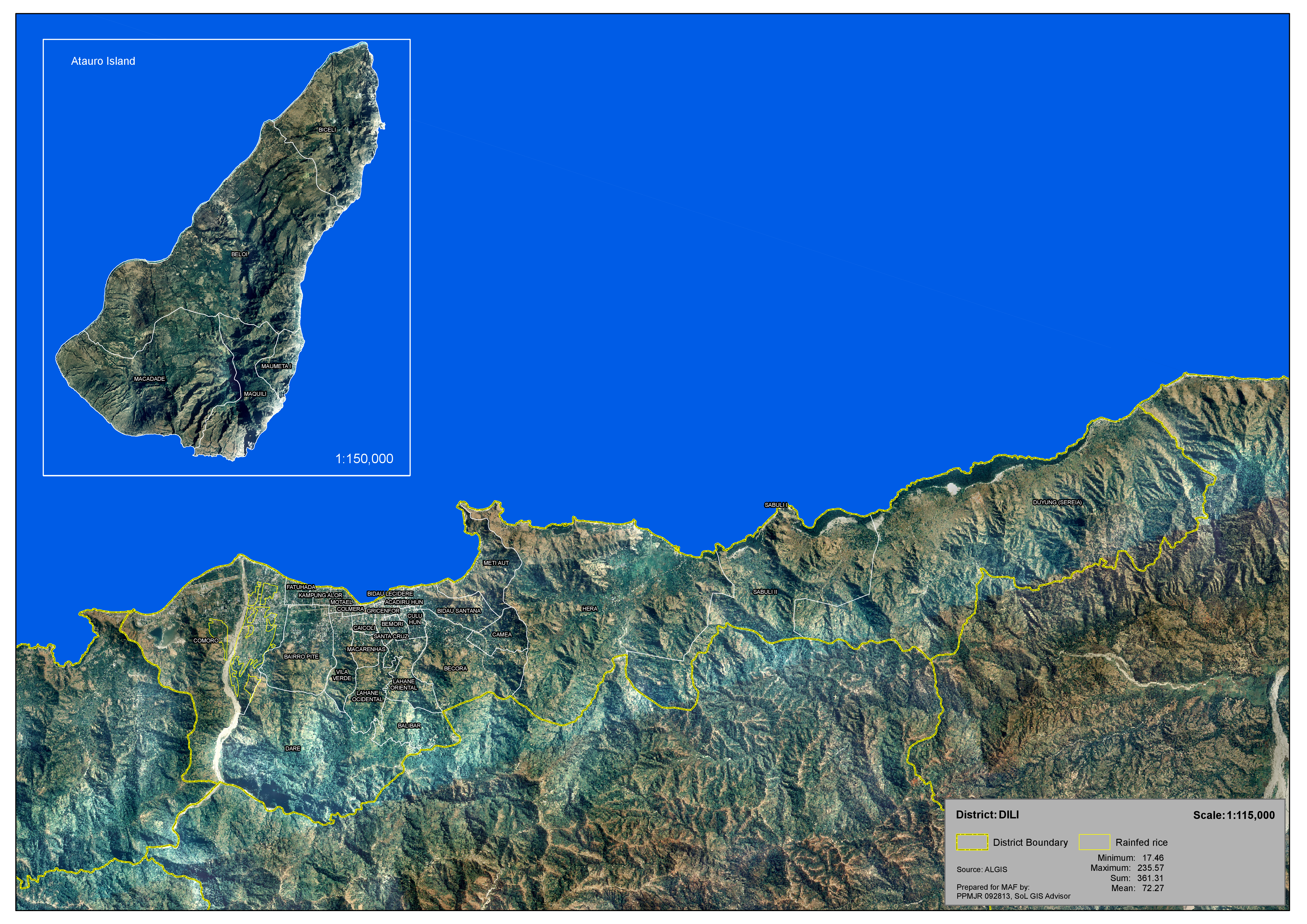 Reisfelder im Distrikt Dili